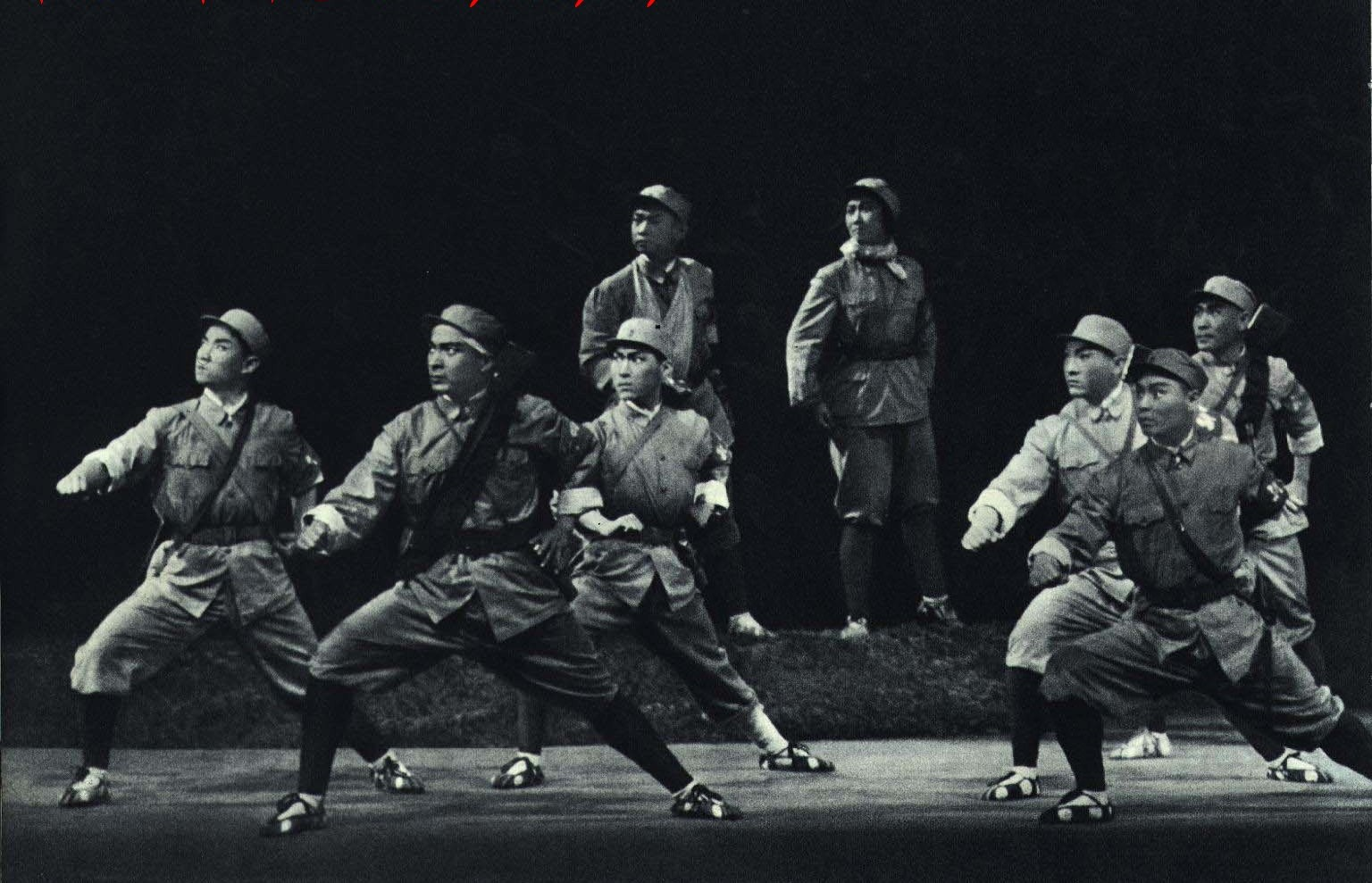 1967-08 1967年 沙家浜